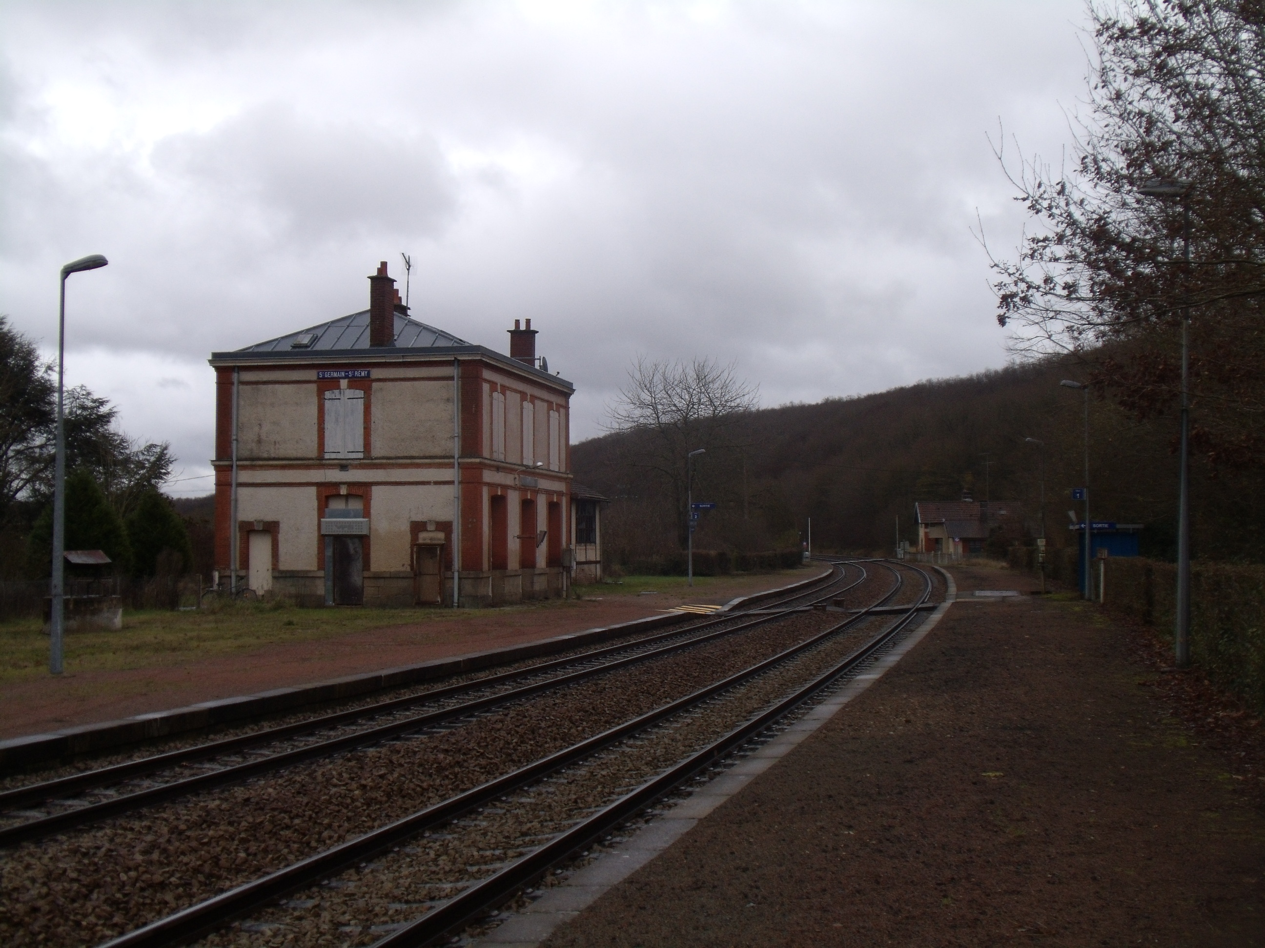 direction Dreux